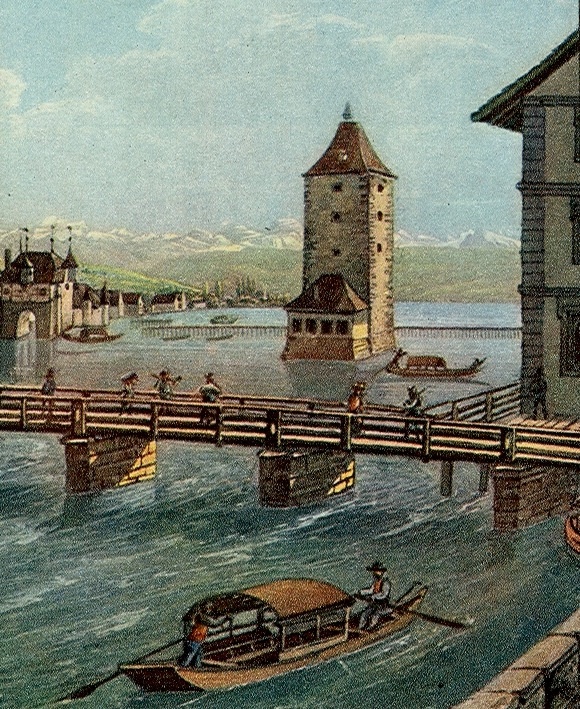 Der Wellenbergturm in Zürich und die alte Münsterbrücke. Aquarell